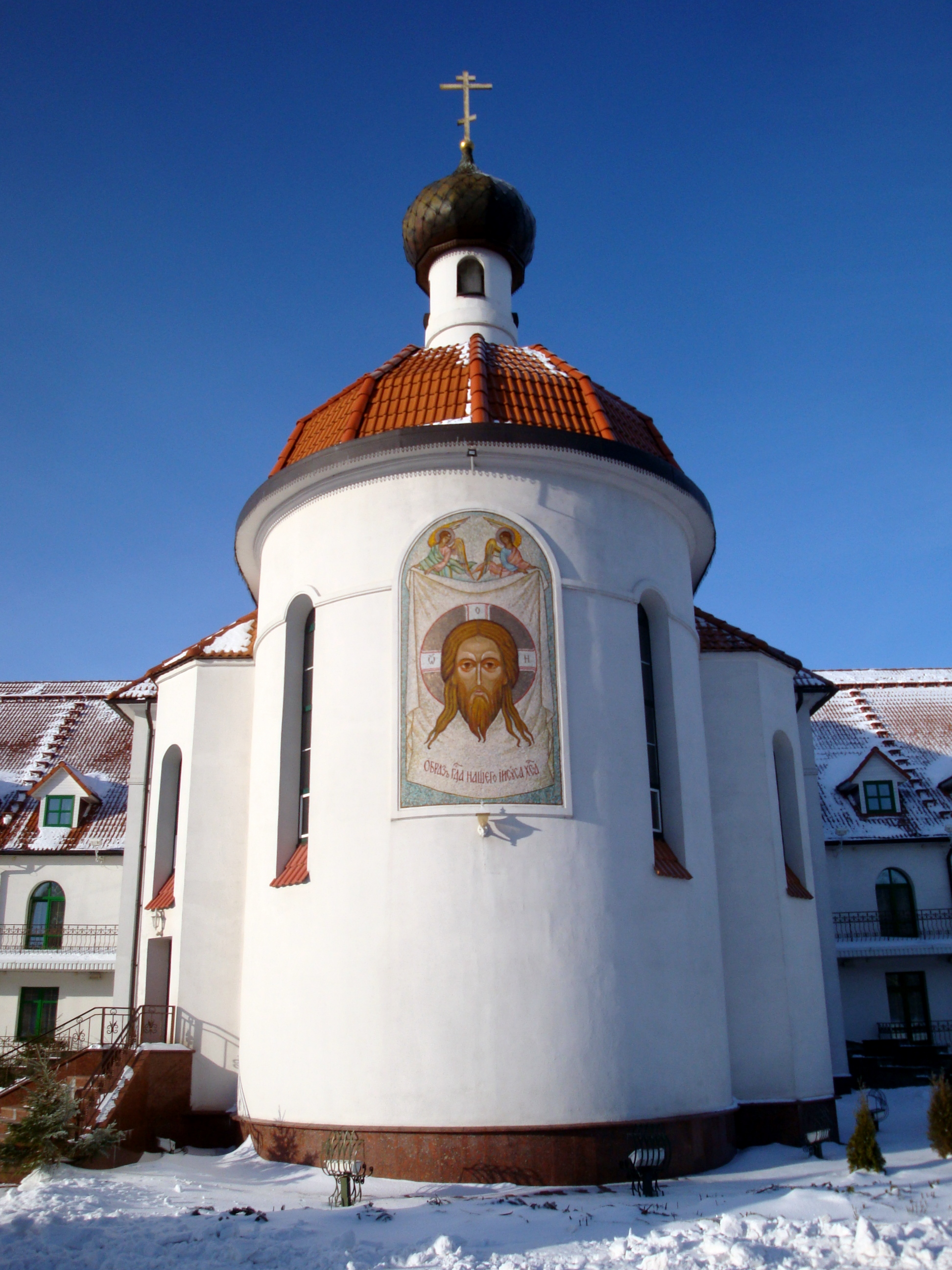 Church, Minsk